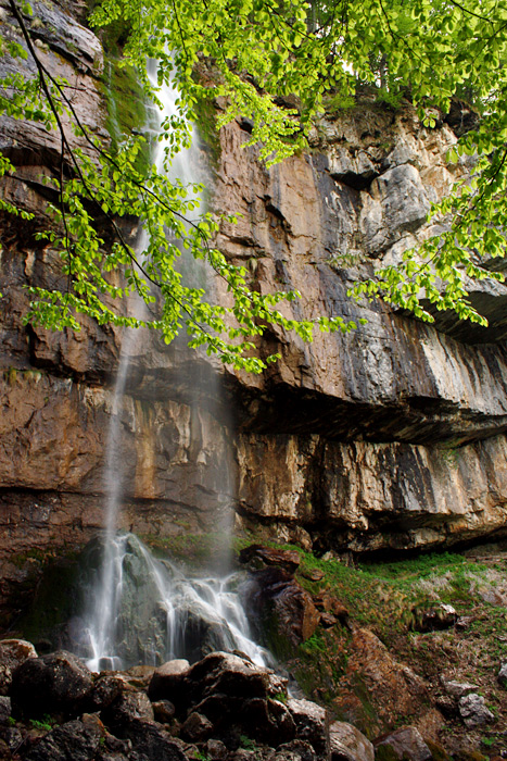 Водопад Боров камък във Врачански балкан